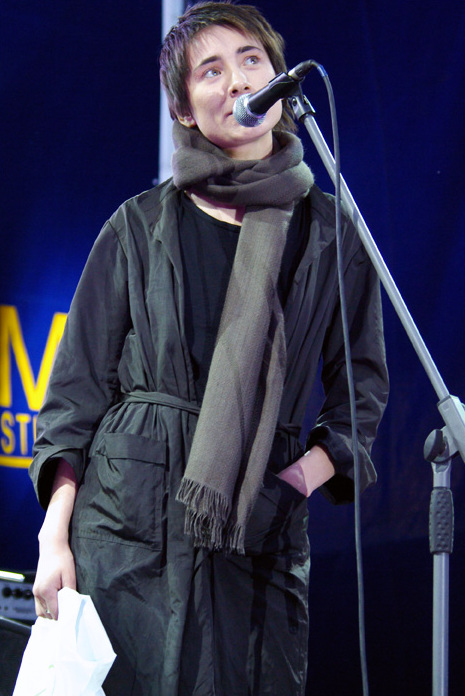 Russian singer Zemfira (Певица Земфира на вручении премии «Степной волк» в Центральном доме художника, июнь 2008 г.)